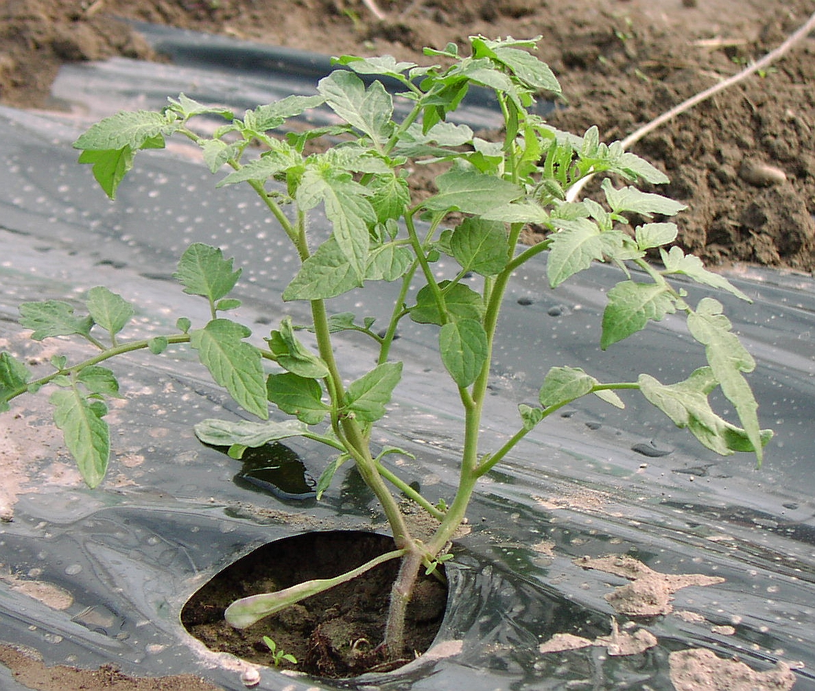 Tomatenpflanze ausgepflanzt 2-triebig veredelt